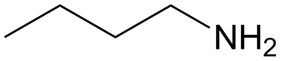 n-butylamine